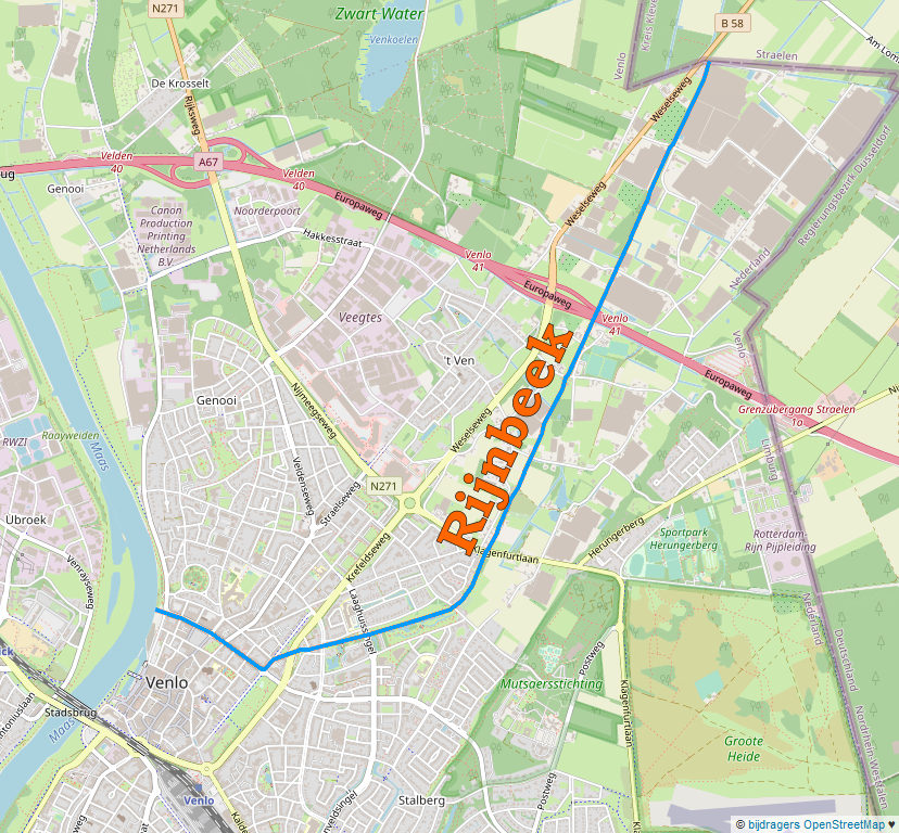 Op Openstreetmap gebaseerde kaart met daarop aangegeven de Rijnbeek te Venlo.